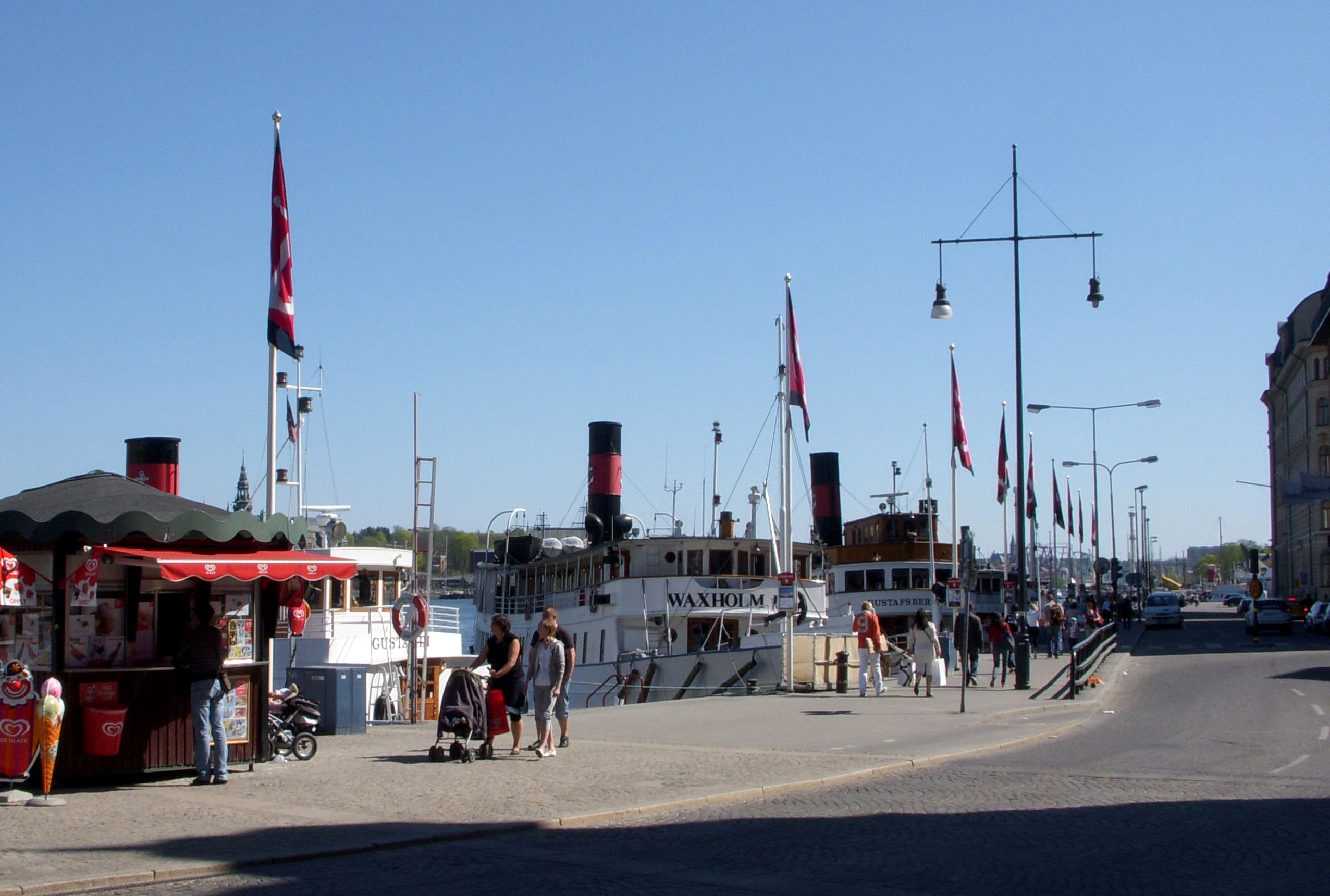 Nybrokajen, Blasieholmen i Stockholm